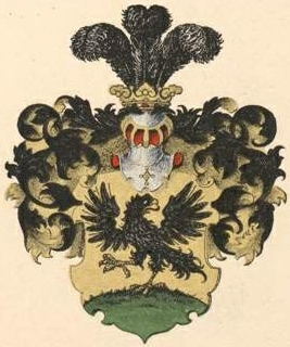 Aderkasi suguvõsa aadlivapp